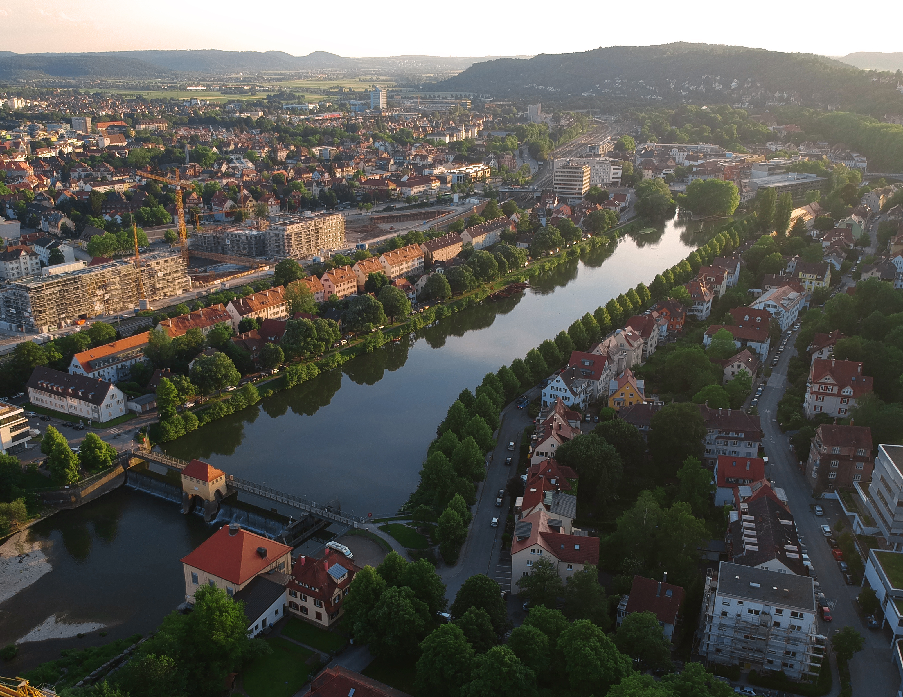 Tübinngen. Neckar mit dem Stauwehr